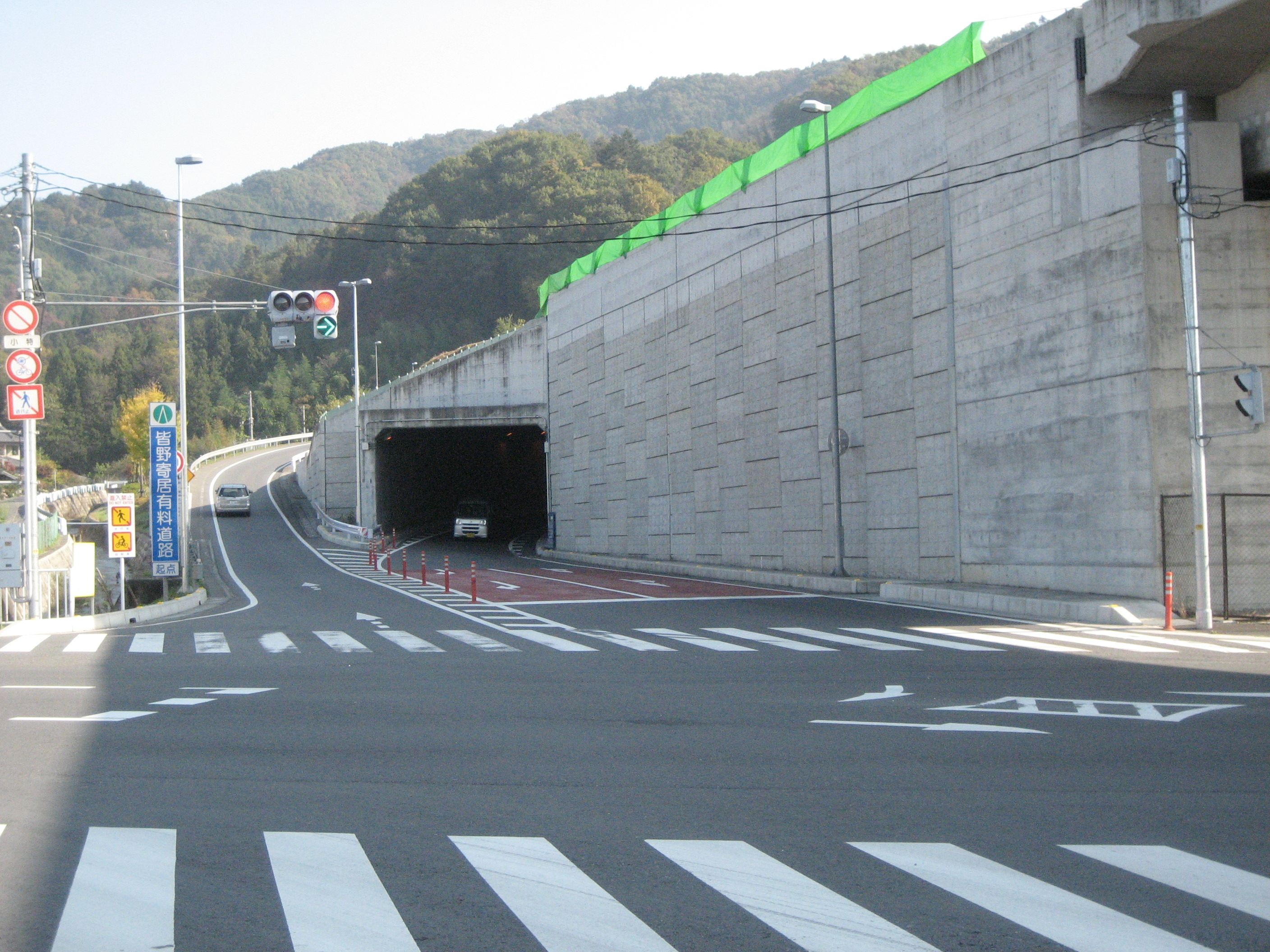 寄居皆野有料道路大塚入口